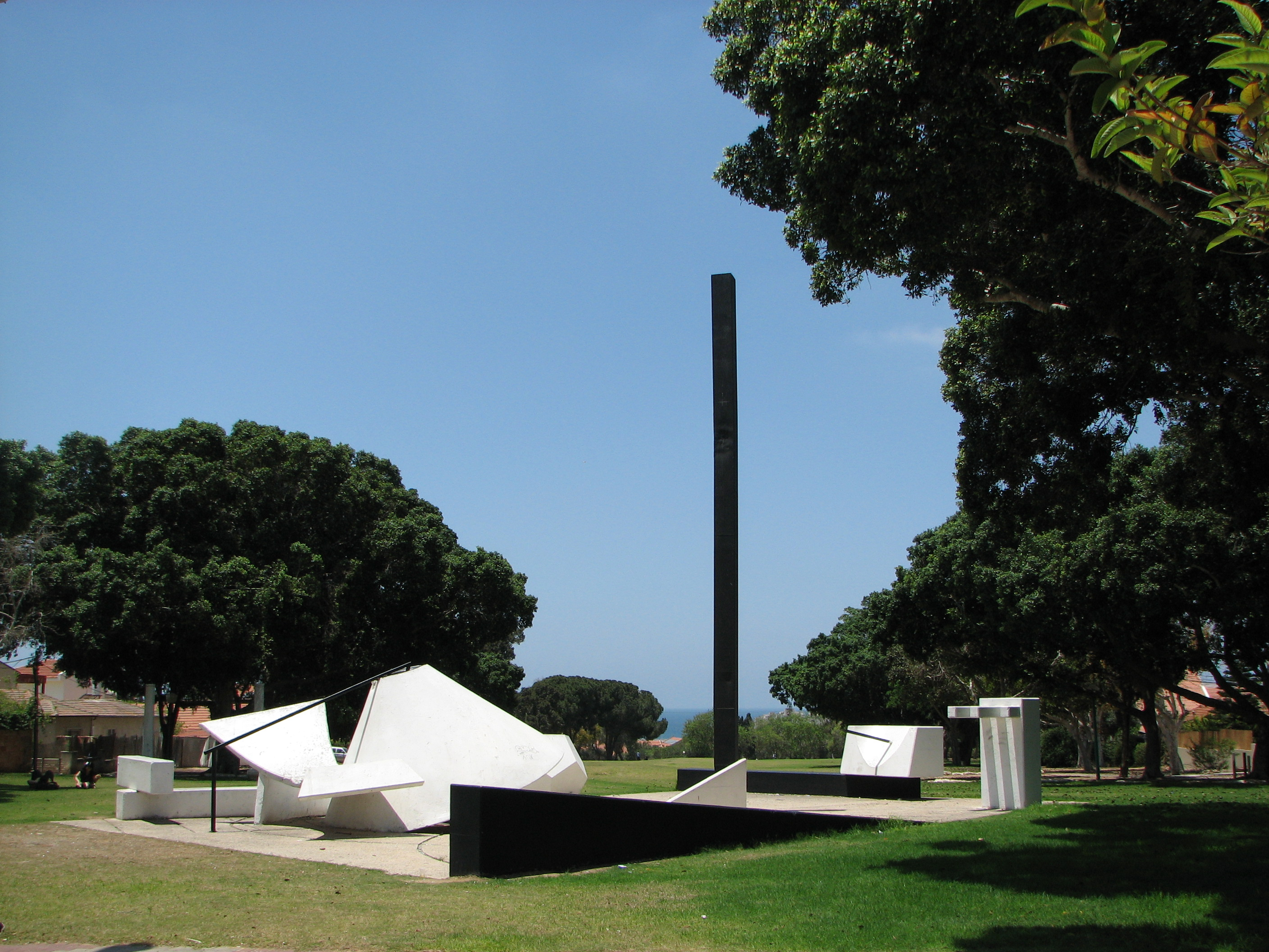 "שעוני השמש" (1970) פסל חוצות מאת יגאל תומרקין, במרכז שכונת אפרידר.